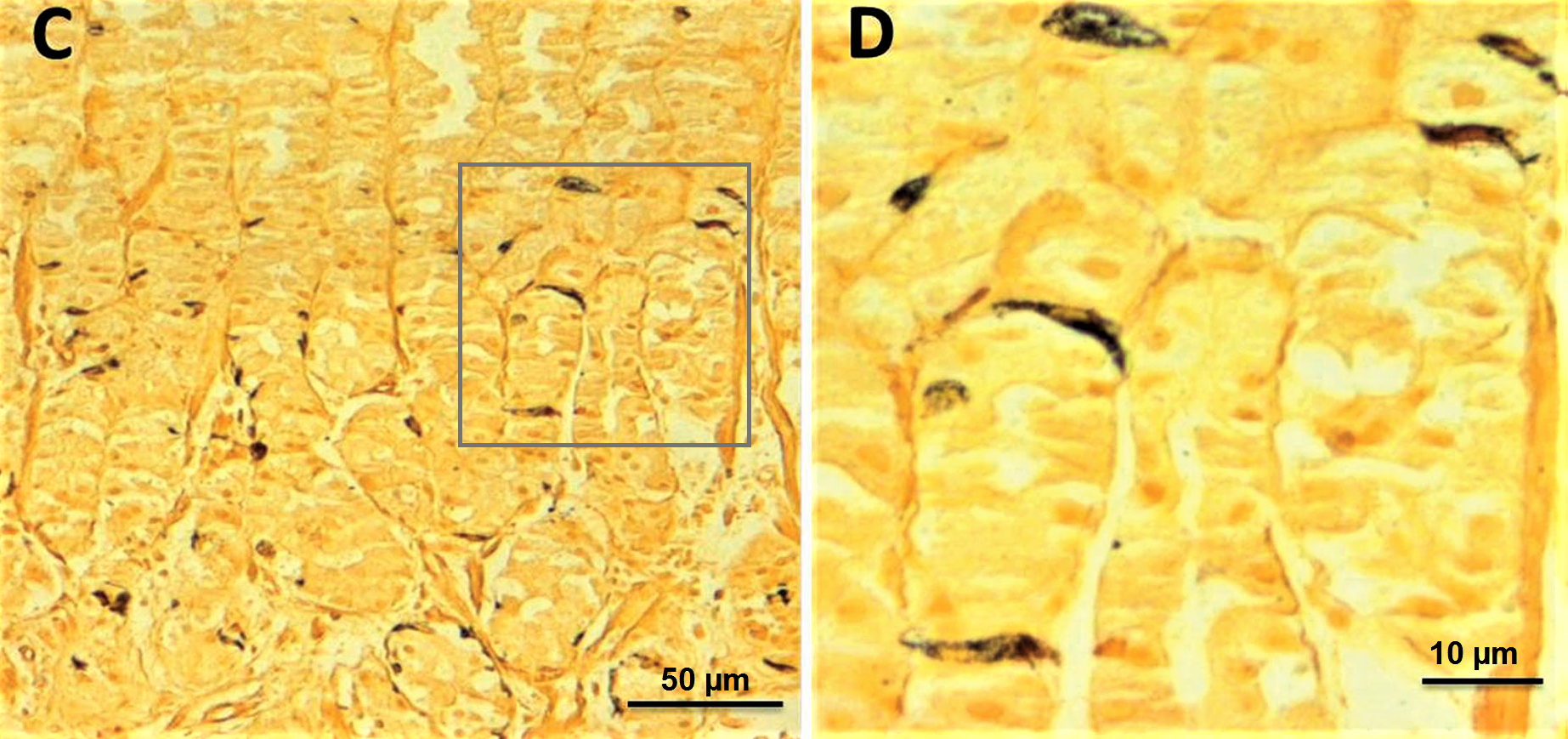 Células argirofílicas teñidas, mediante la técnica de Grimelius, en la mucosa gástrica oxíntica. En C vista a mediano aumento: mucosa gástrica antral. En D se observa el sector mostrado a mayor aumento con las células ECL en marrón oscuro.